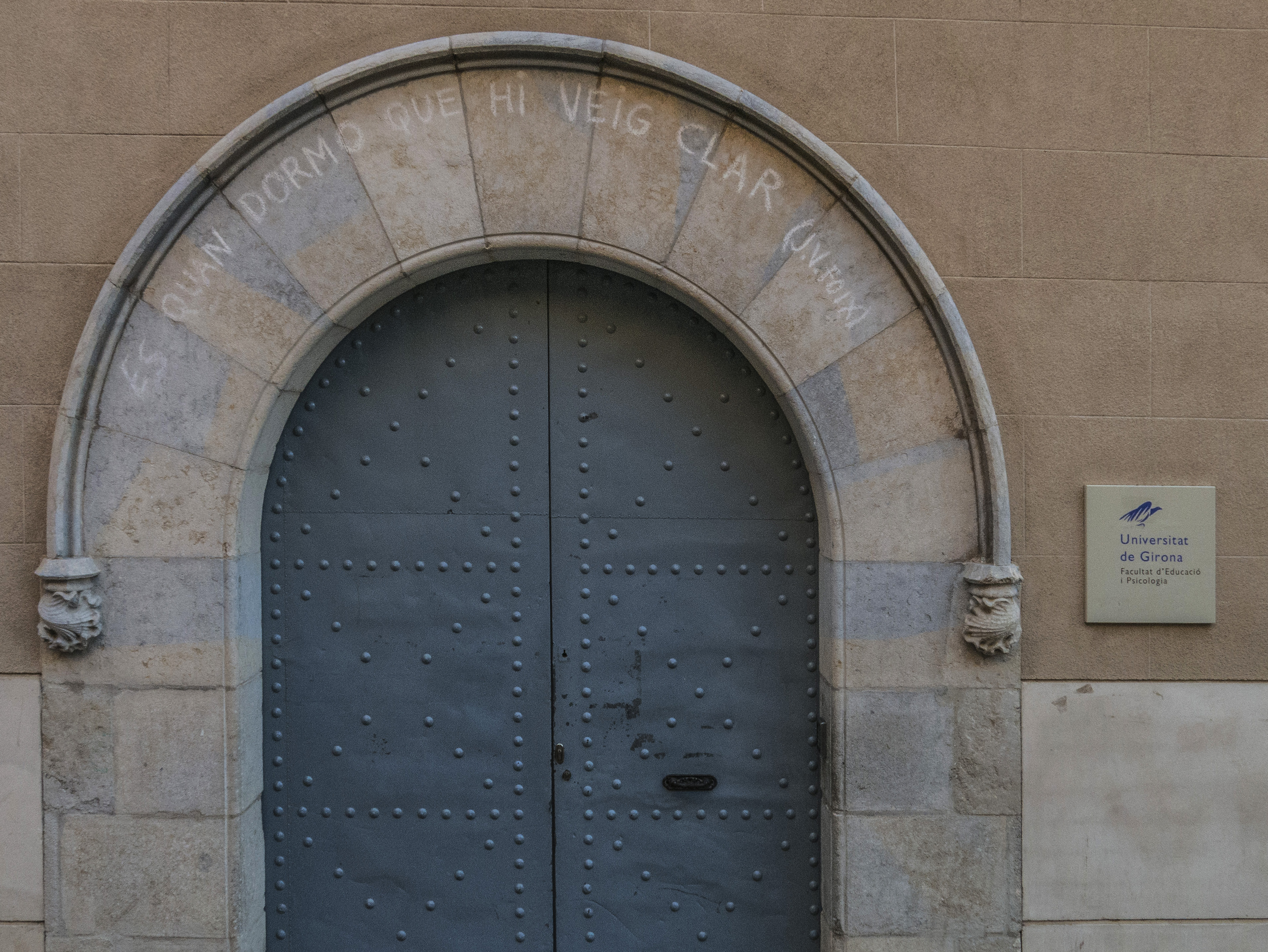 Girona és una ciutat i un municipi del nord-est de Catalunya, capital de la comarca del Gironès.